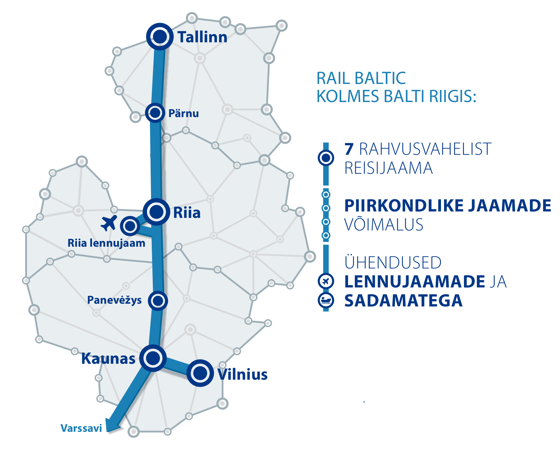 Rail Balticu reisijaamad